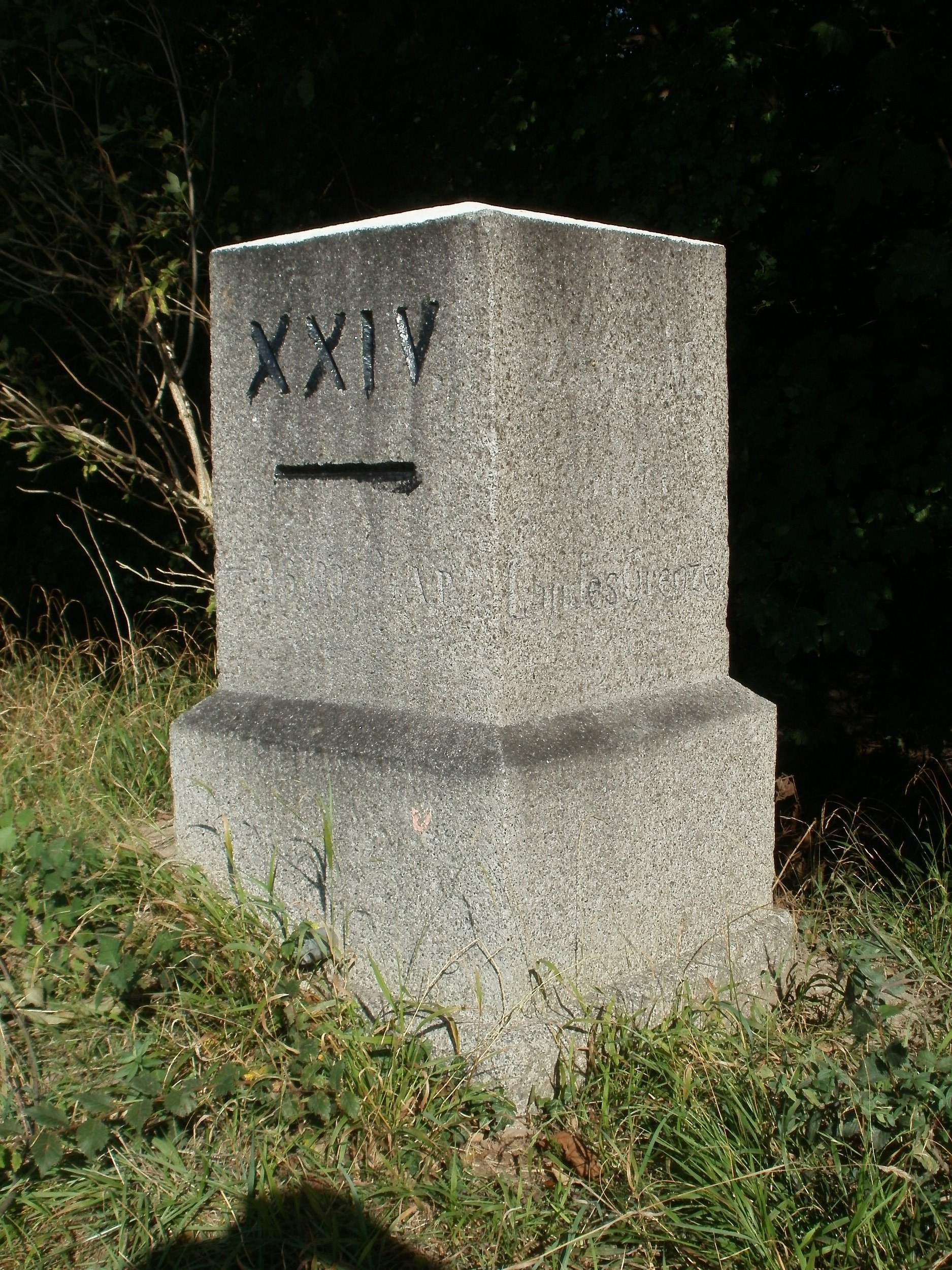 Myriameterstein 24 (Ketsch)